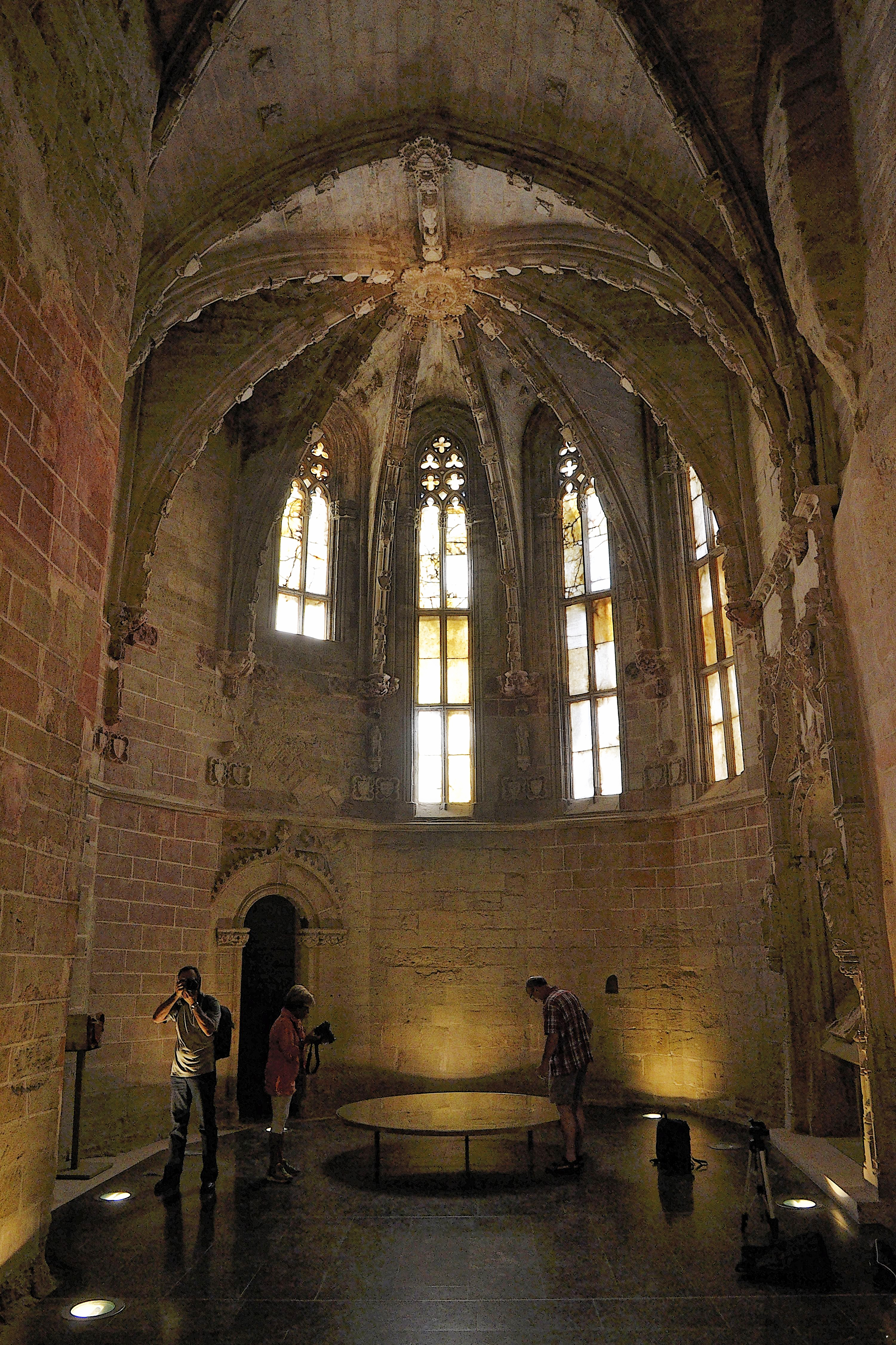 Capilla de la Epifanía (Seu Vella de Lleida)